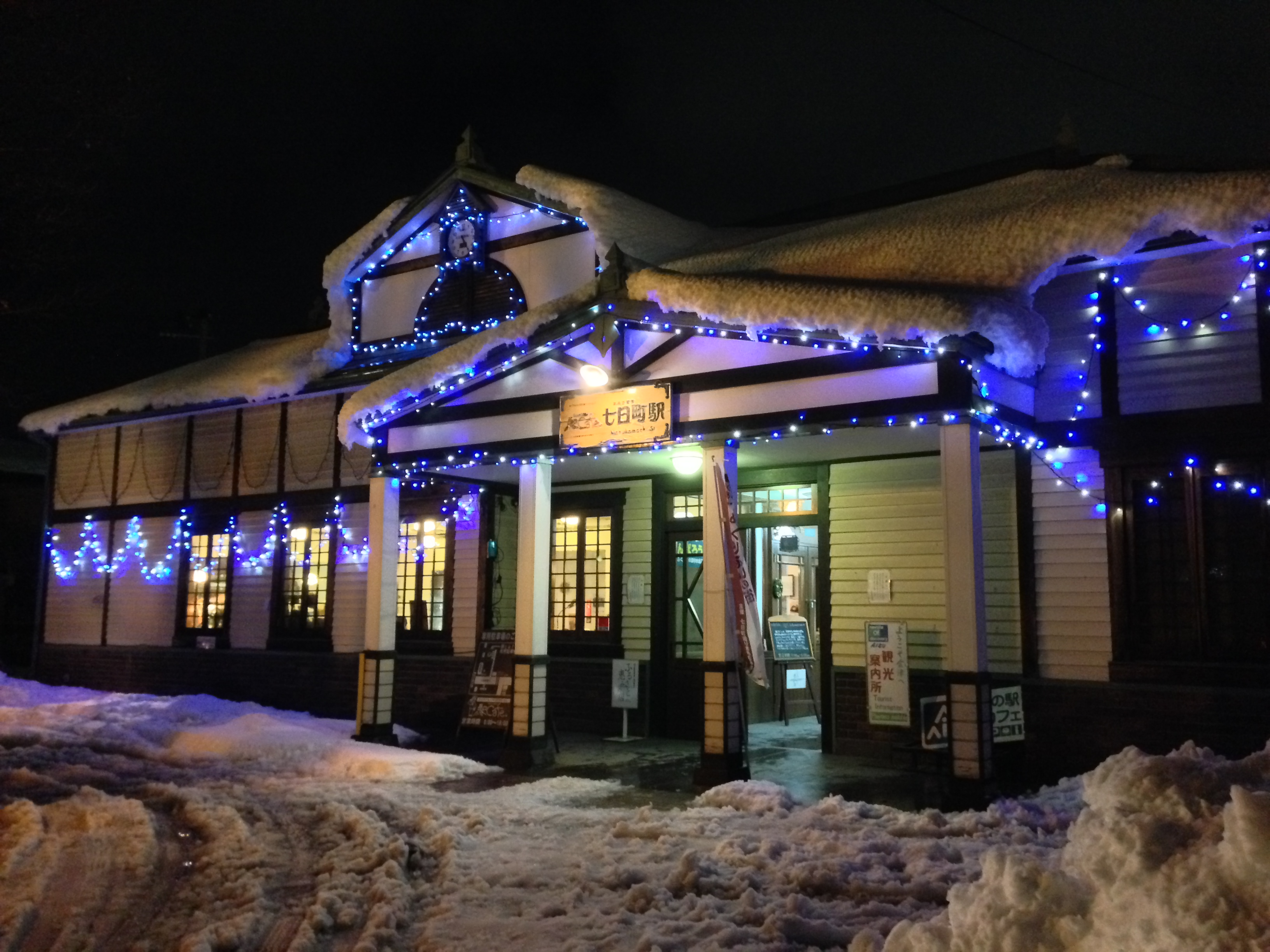 イルミネーションが施された七日町駅舎